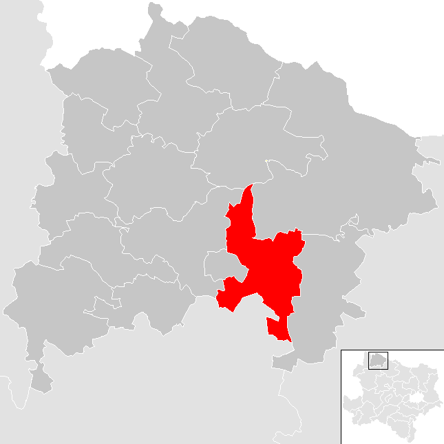 Bezirk Waidhofen an der Thaya